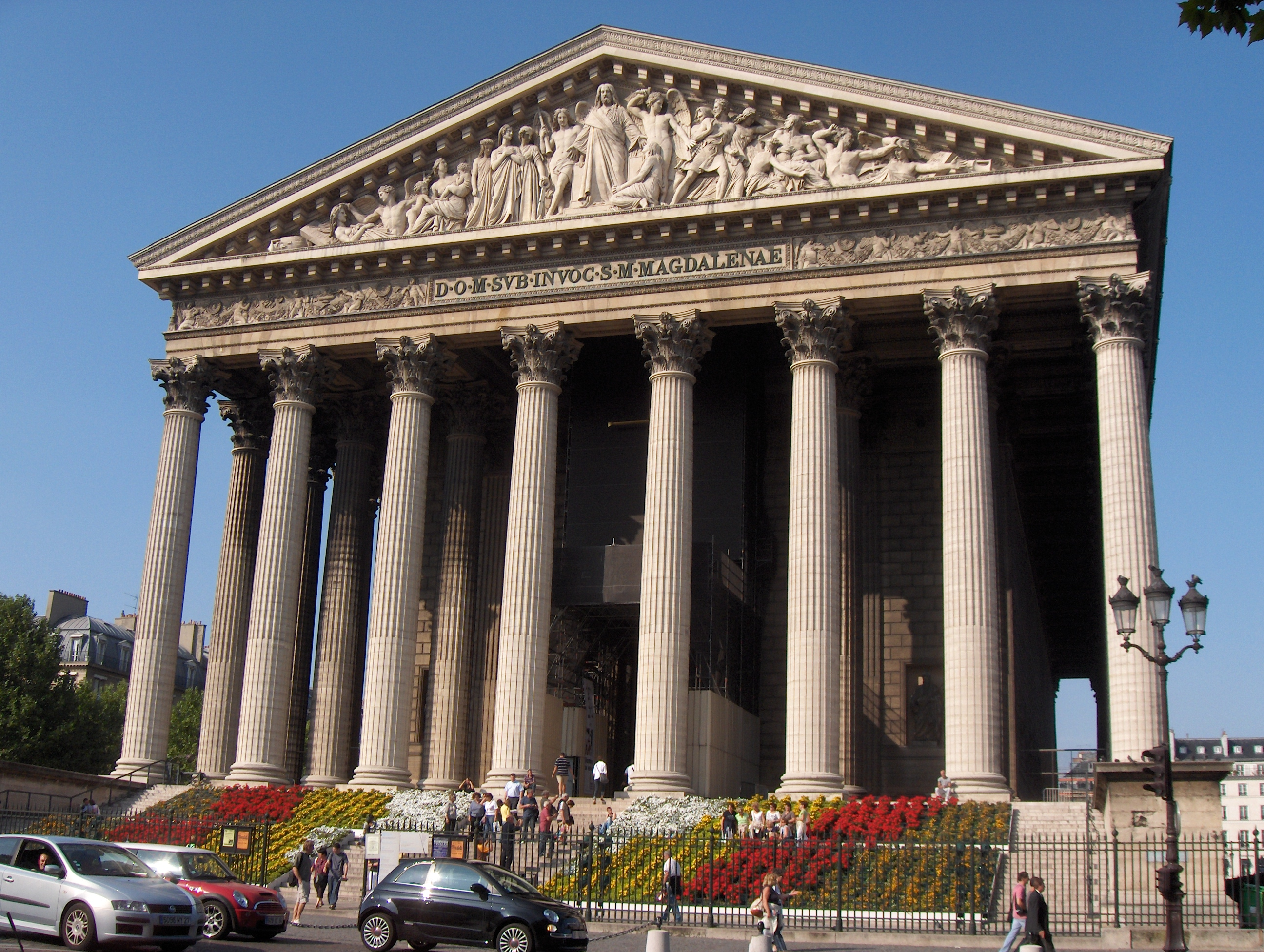 Photographie personnel de Sainte Marie-Madeleine, Place de la Madeleine, Paris 8eme